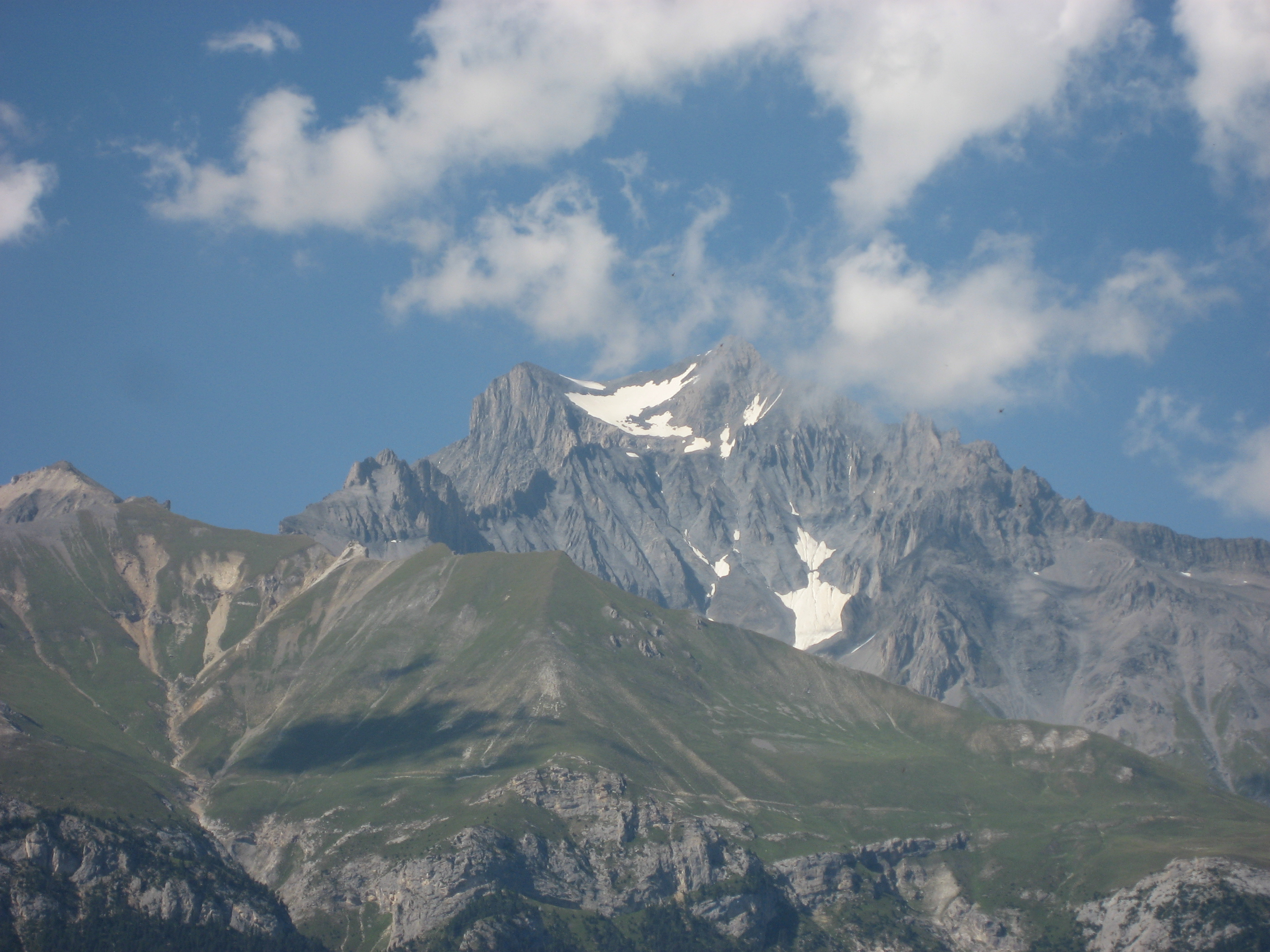 Dent Parrachée taken from the village of Bramans in the Vallée de la Maurienne Dent Parrachée Location: Map: 45° 17' 31" N 6° 45' 22" E